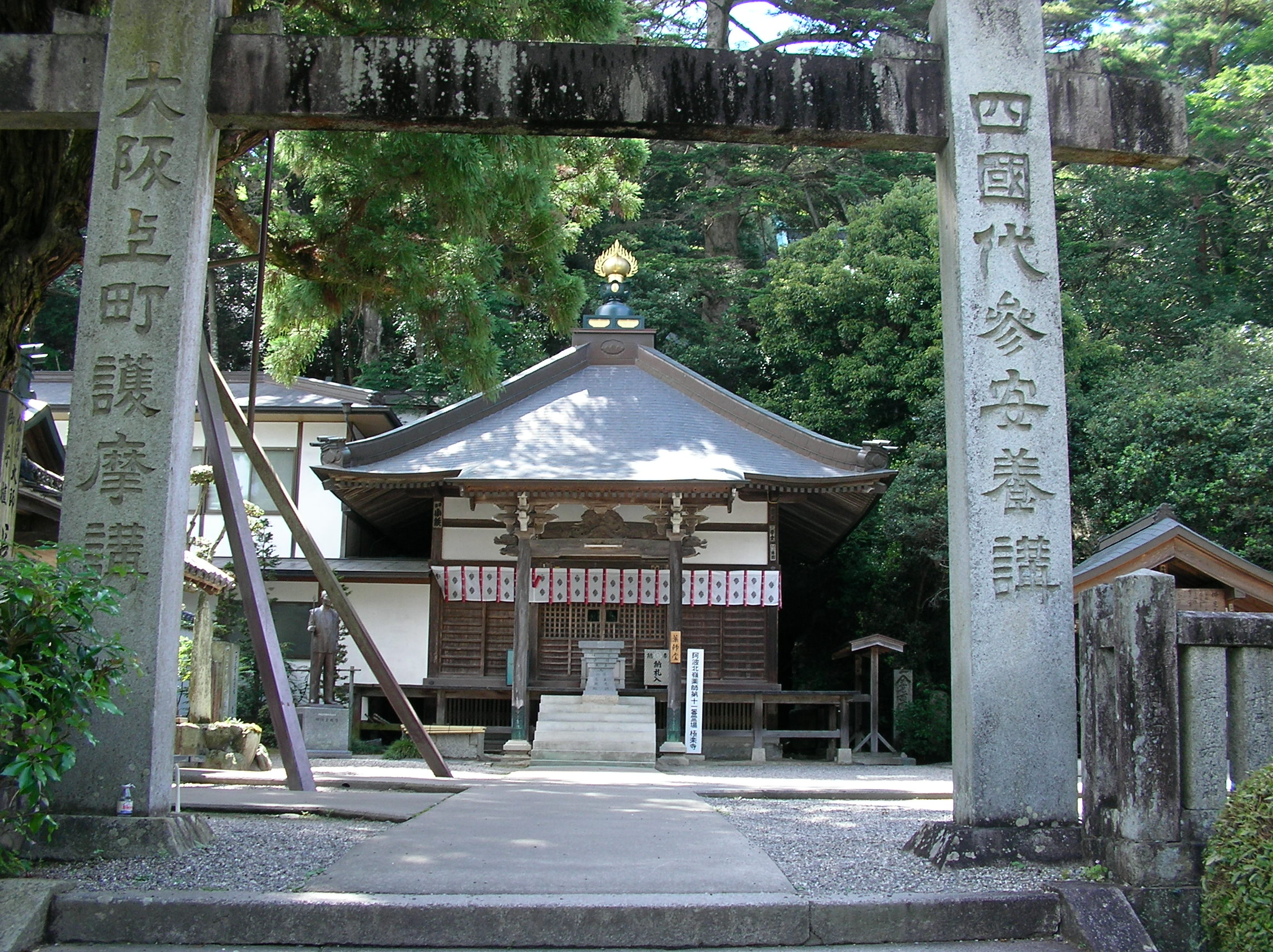 nishozan-gokurakuji-yakushido